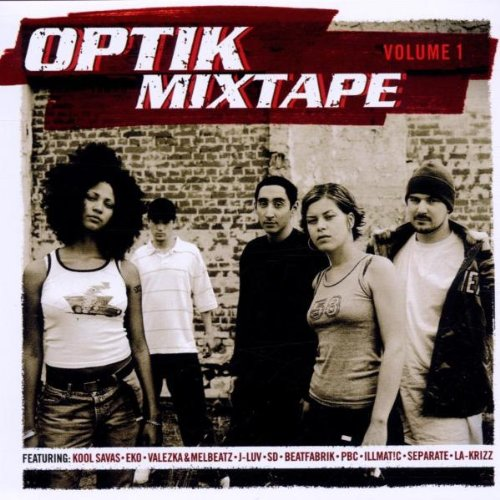 Cover des Mixtapes „Optik Mixtape Volume 1“